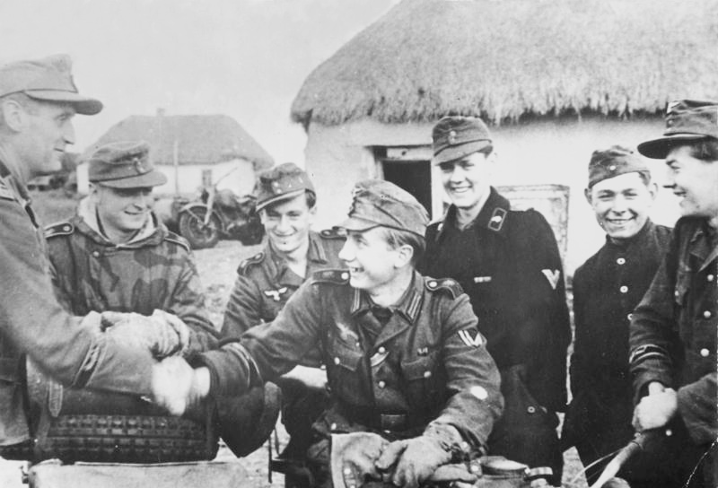 Bei "Großdeutschland" an der Ostfront. Herzlichen Glückwunsch! Ein besonders bewährter Kraftfahrer hat das Goldene Kraftfahrerabzeichen erhalten. Der Obergefreite H. ist 5 Jahre Soldat und seit Beginn des Krieges Kradmelder im Grenadierregiment "Großdeutschland ". PK Brönner , E.M. Orbis